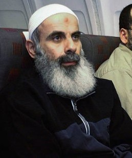 השייח' עובייד (משמאל) במטוס לגרמניה